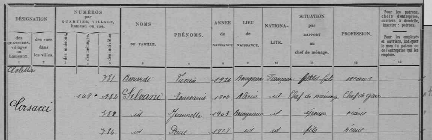 Recensement consultable en ligne sur le site des archives départementales de la Corse du Sud